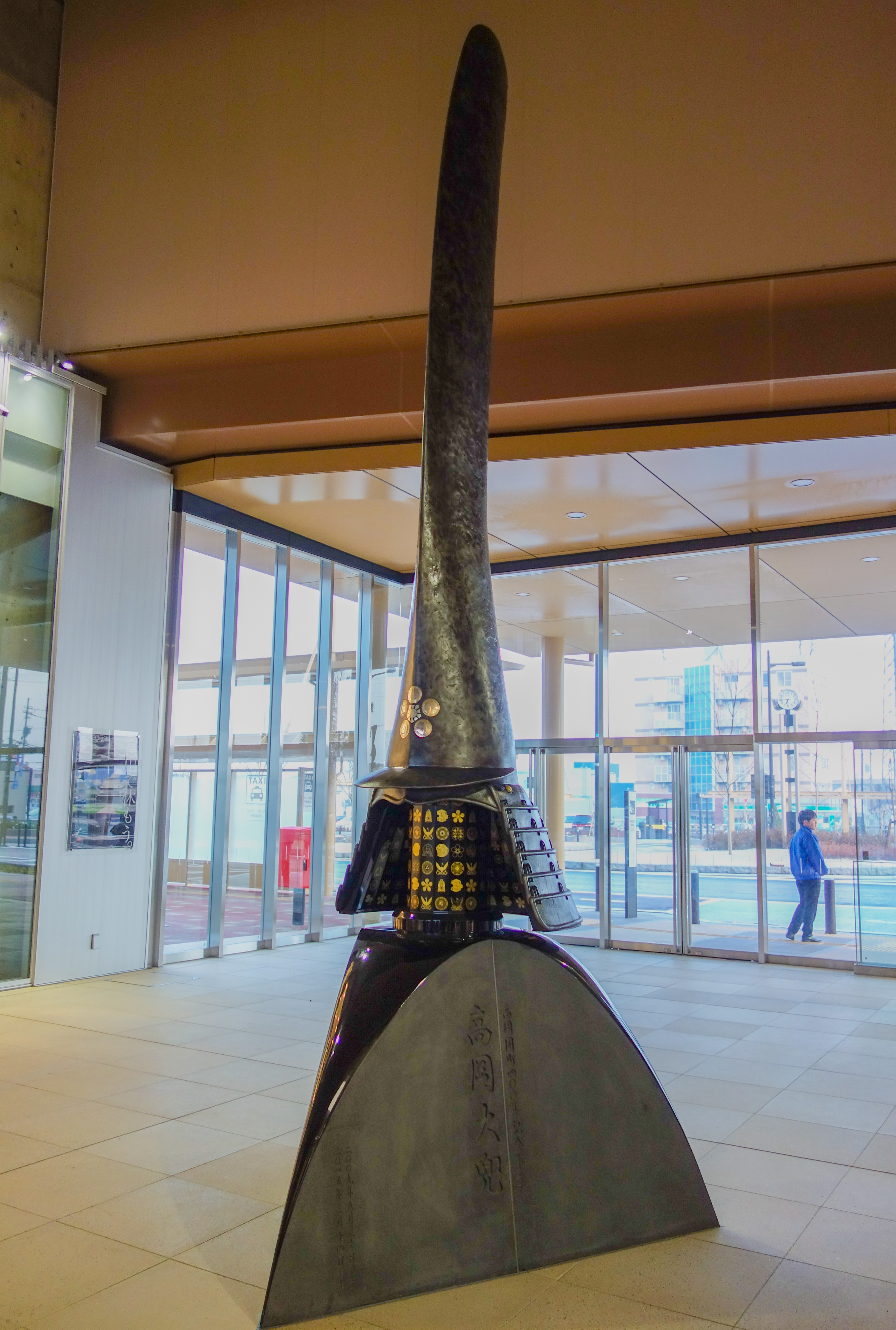 新高岡駅 高岡大兜 銀鯰尾形（ぎんなまずおなり）兜がモチーフ。